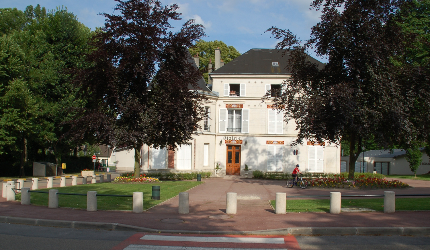 Hôtel de Ville depuis 1970